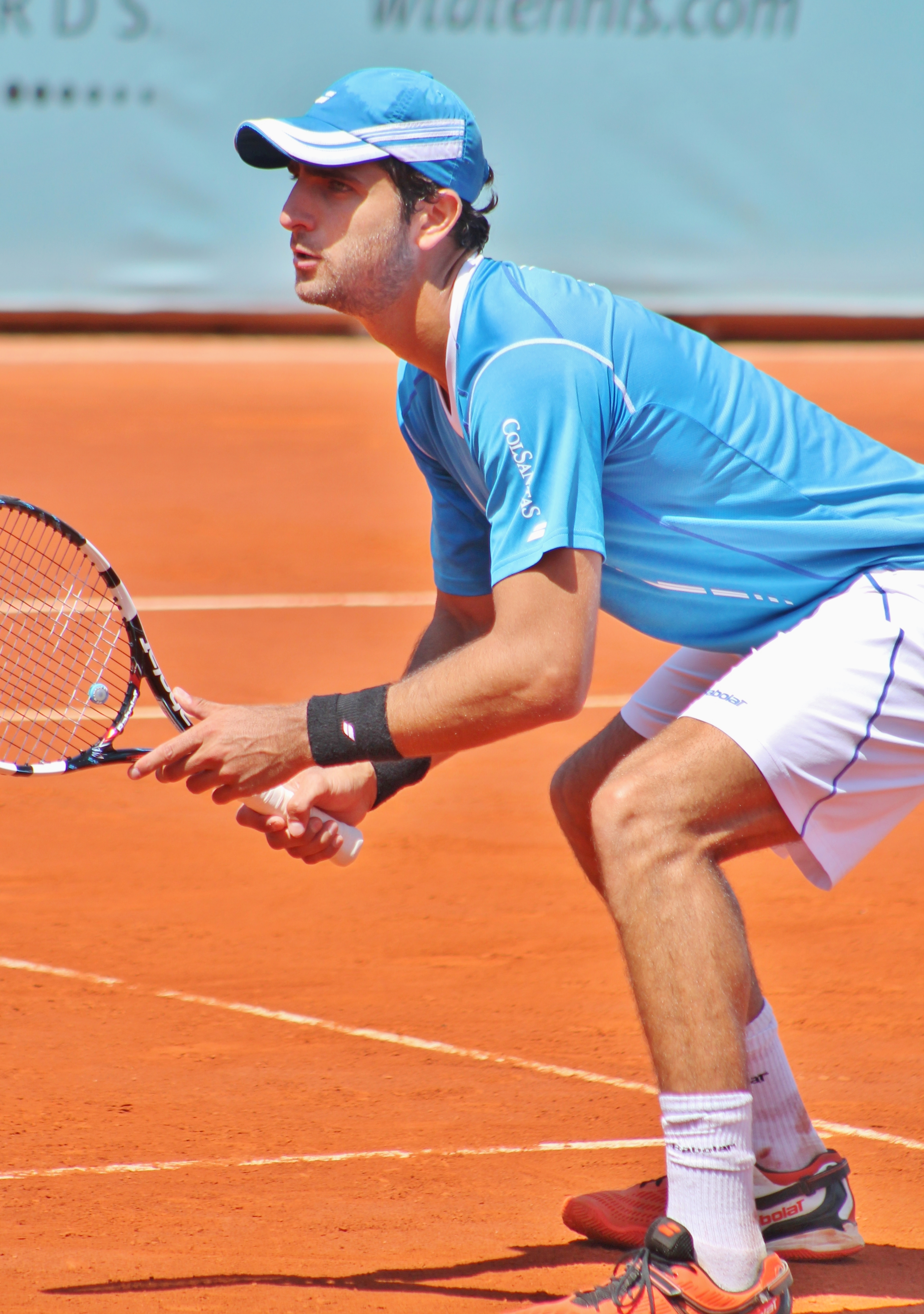 Farah MA14 (6) - Copy